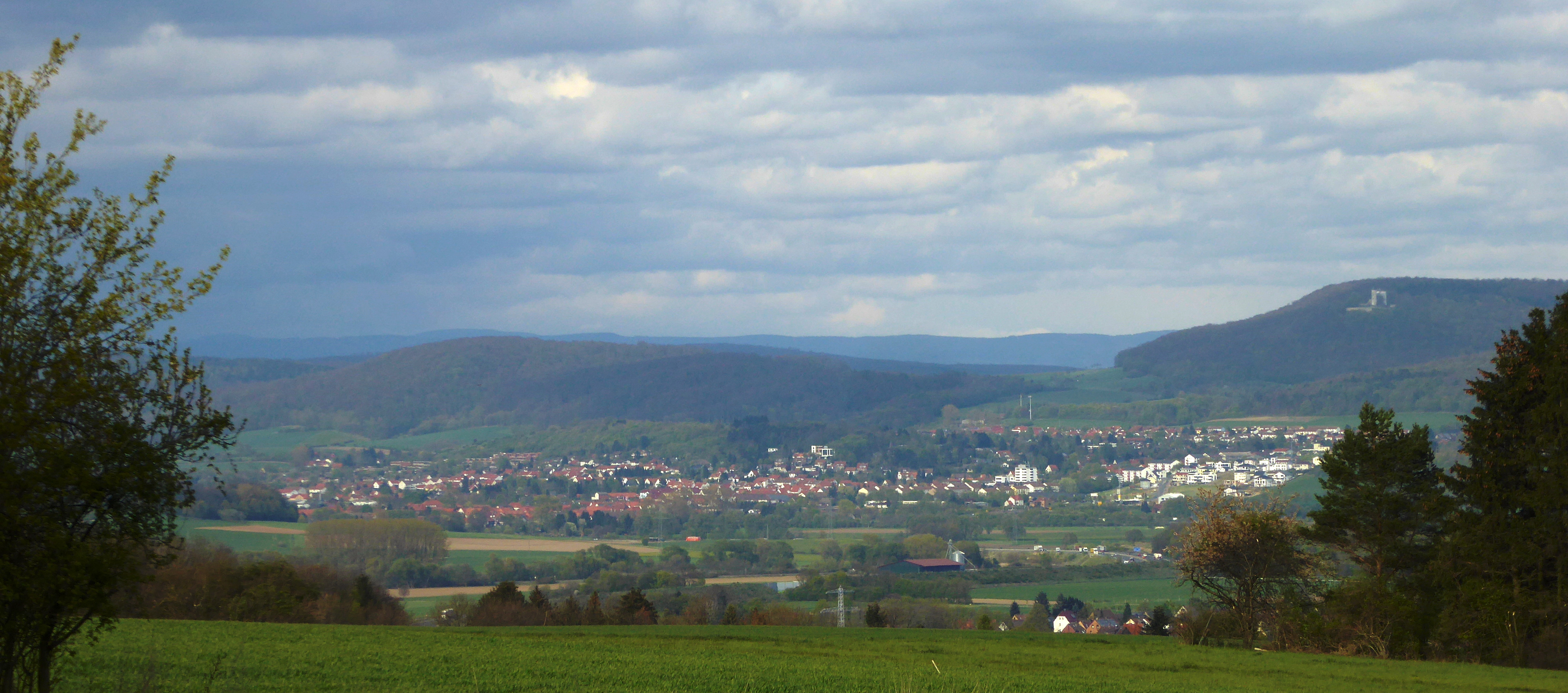 Blick vom Sommerberg über das Leinetal auf Bovenden. Im Hintergrund rechts der Plessforst mit der Burg Plesse, links der Nörtener Wald, ganz hinten der Harz